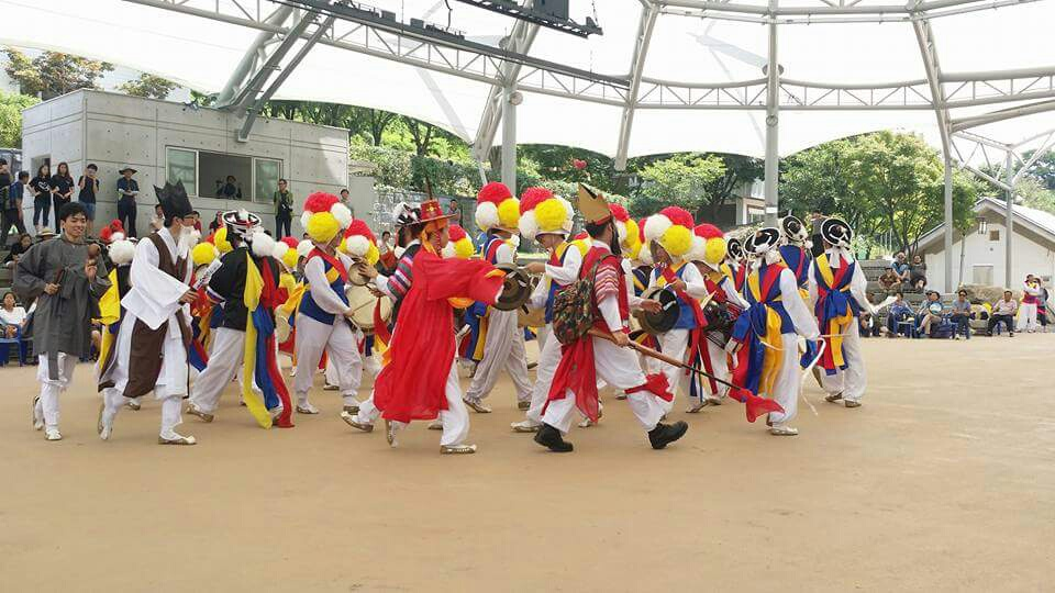 임실 필봉 농악